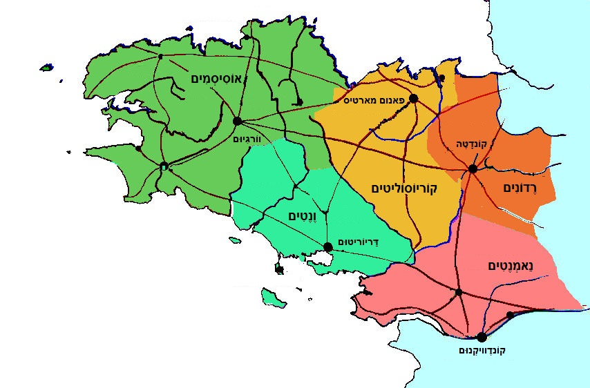 מפת העמים הגאלים בברטאן של ימינו